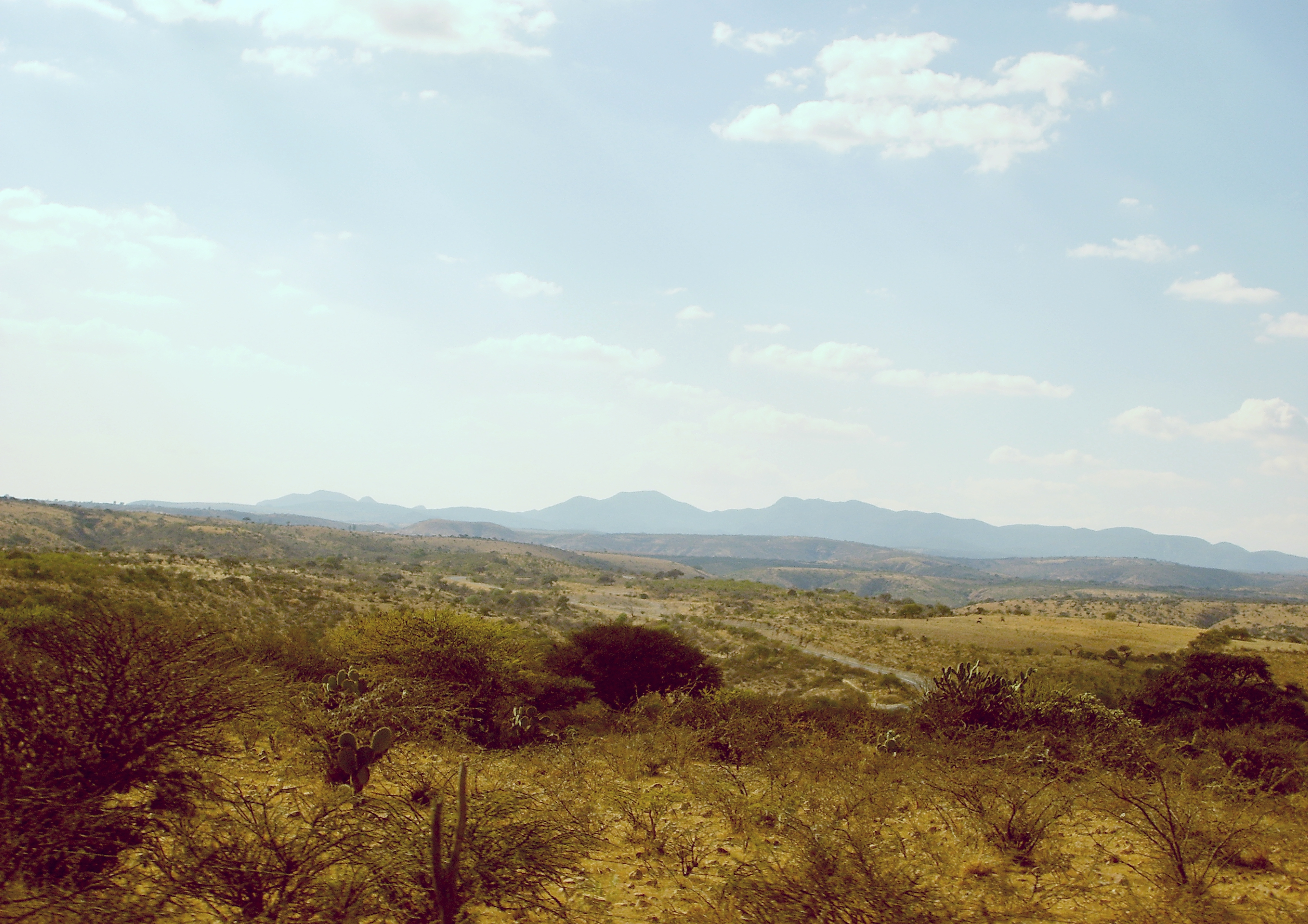 Matorral xerófilo de Dolores Hidalgo, Guanajuato, México. El municipio de Dolores Hidalgo presenta un clima predominantemente semiárido, el tipo de vegetación presente es el matorral xerófilo. Fotografía tomada en Carretera Federal 110, 19 de agosto de 2008.